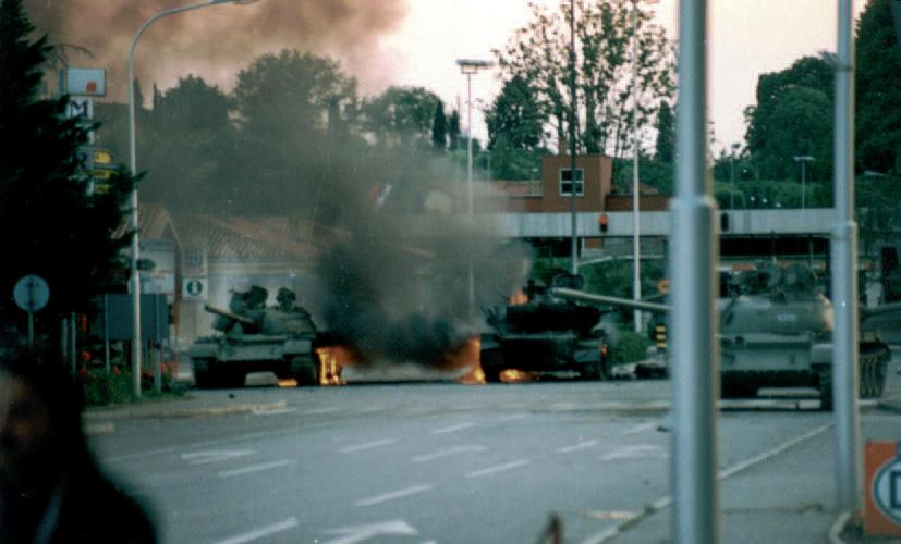 Spopad za mejni prehod Rožna Dolina